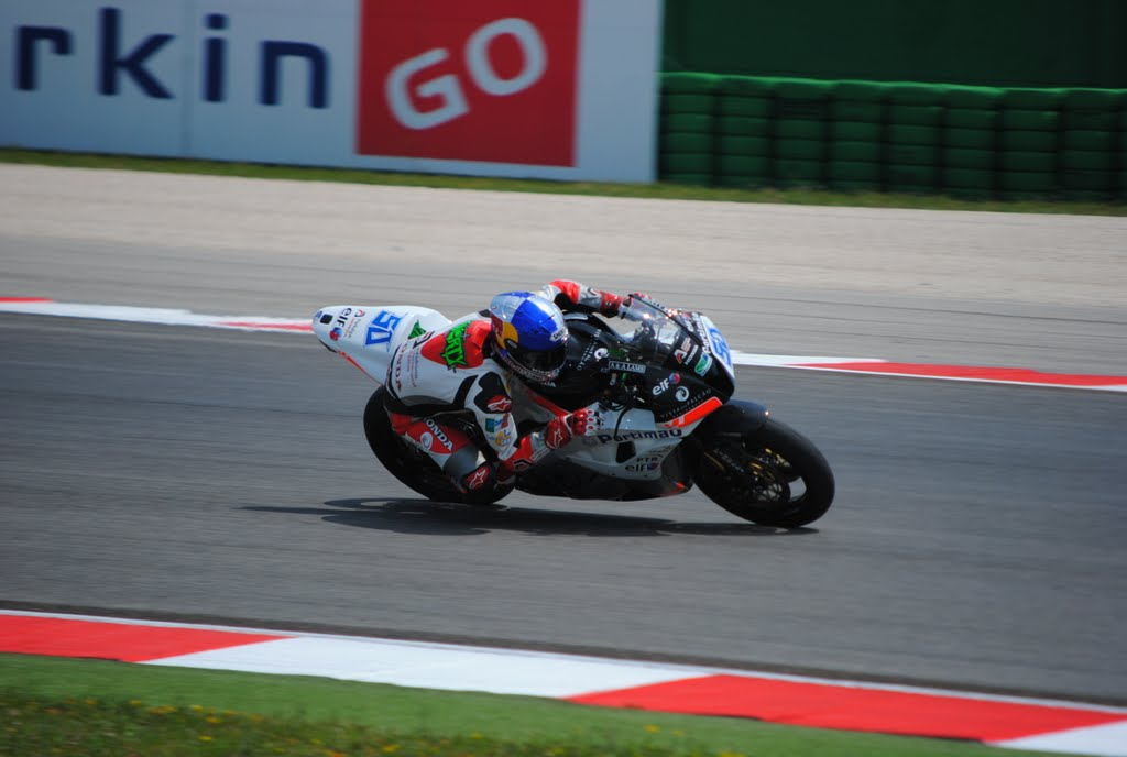 Eugene Laverty a Misano nel 2010